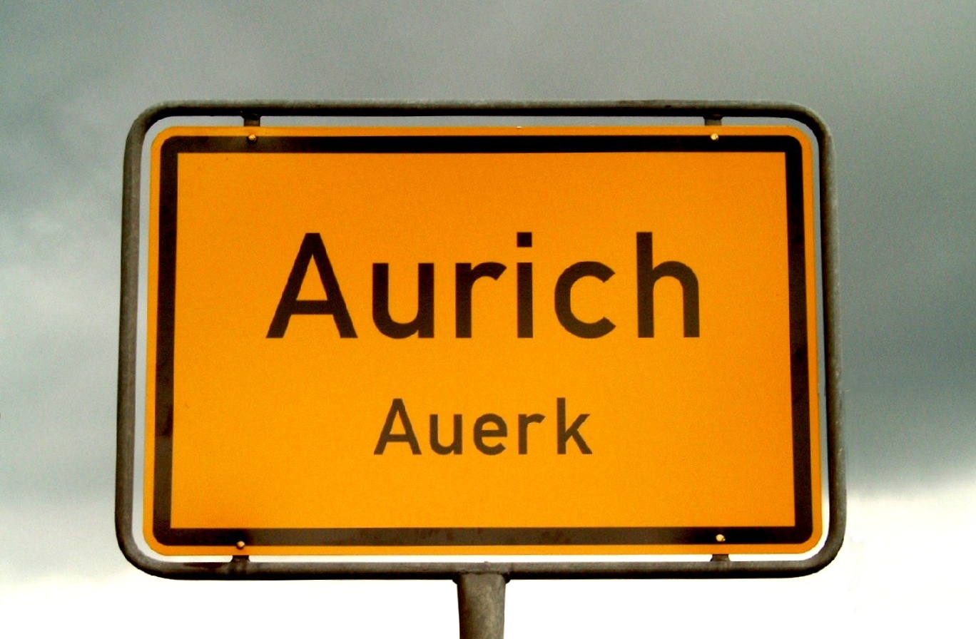 Zweisprachiges Ortsschild der Stadt Aurich in Ostfriesland.